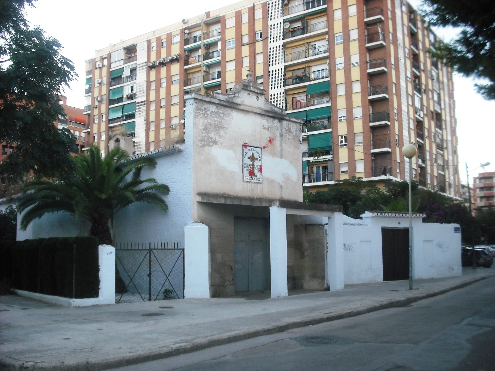 Ermita de Sant Miquel de Soternes, al barri de la Llum, València.